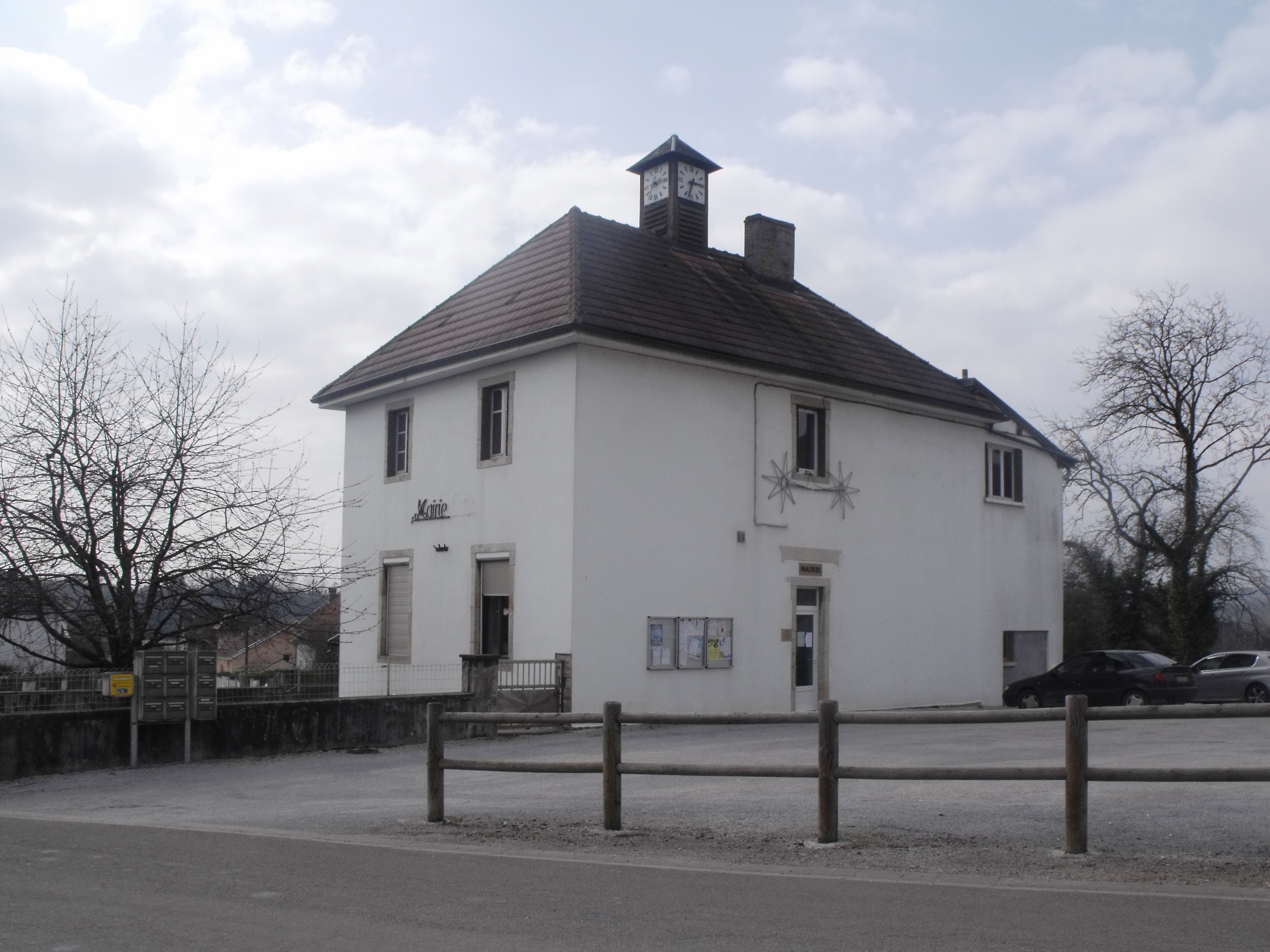 Mairie de la prétière, Doubs, France